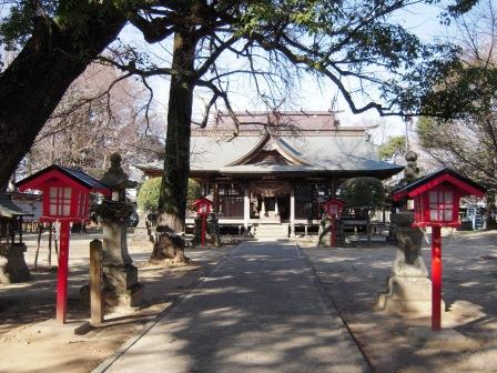 宮原三神宮（熊本県八代郡氷川町）